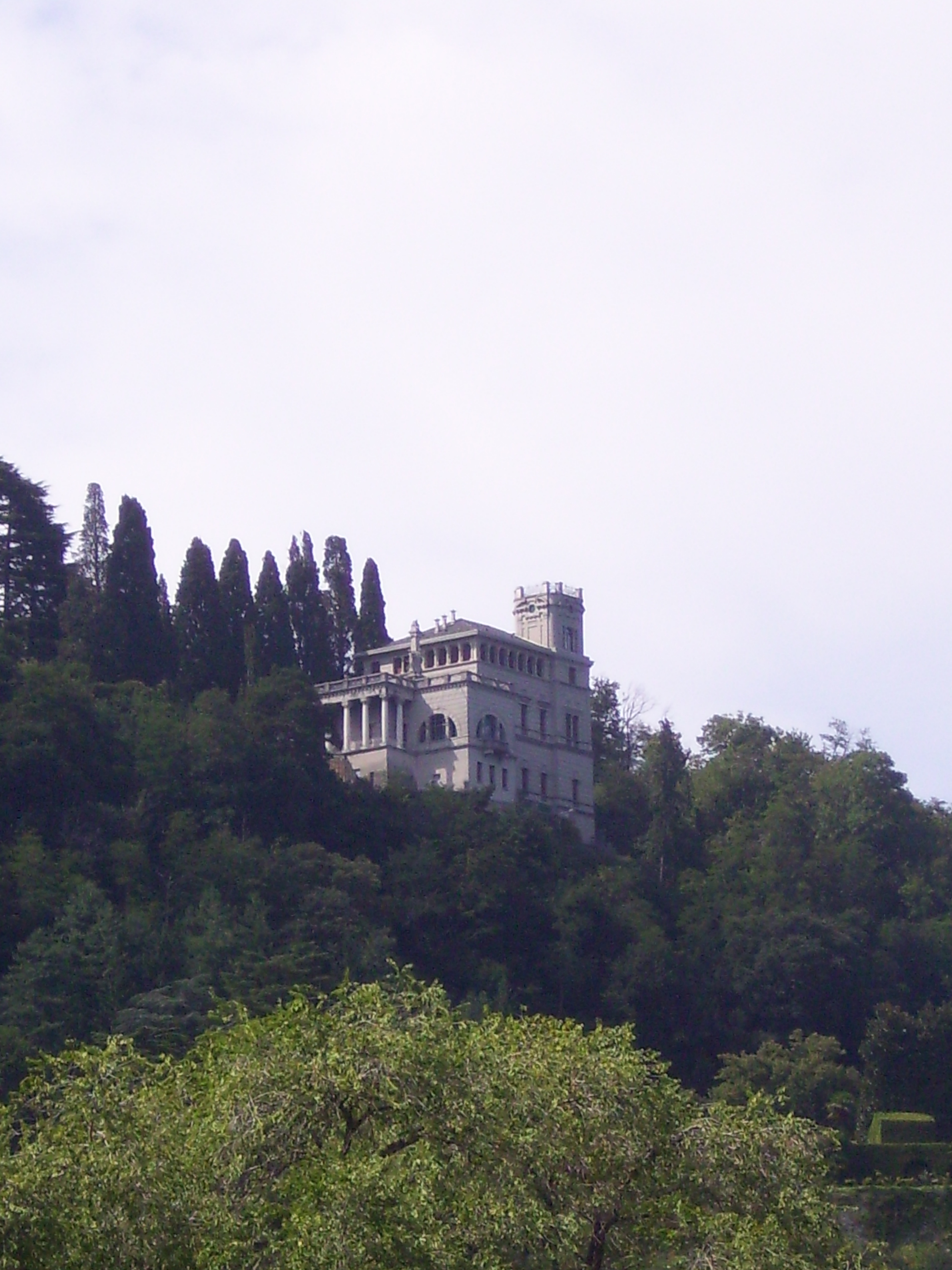 Villa Pisani Dossi, fatta costruire dallo scrittore scapigliato Carlo Alberto Pisani Dossi